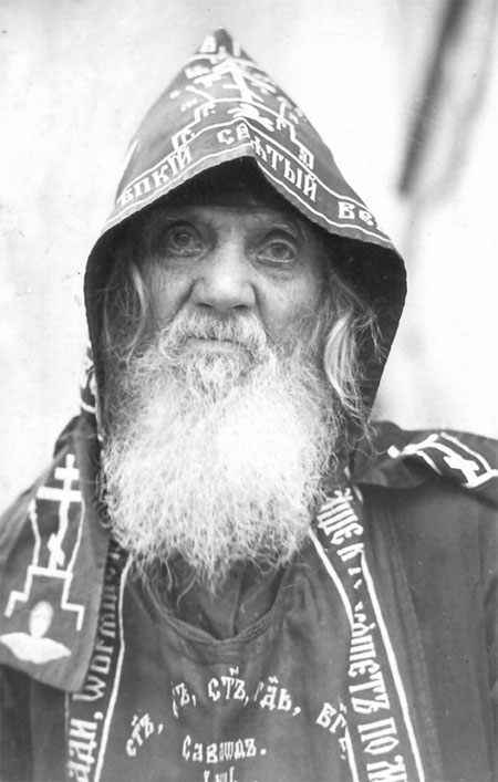 Схиигумен Михаил из Казанского монастыря в Харбине